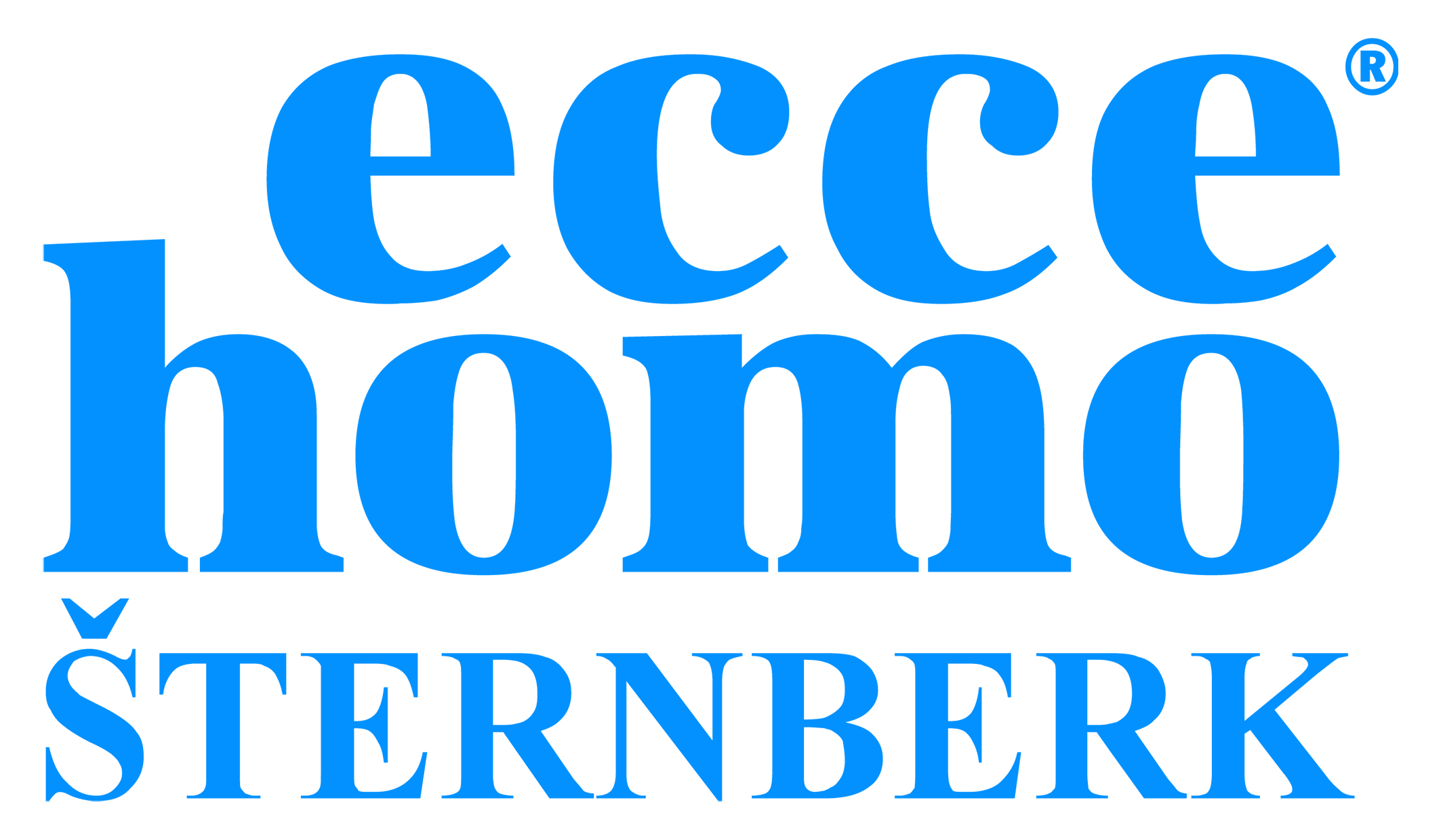 Logo závodu Ecce Homo Šternberk